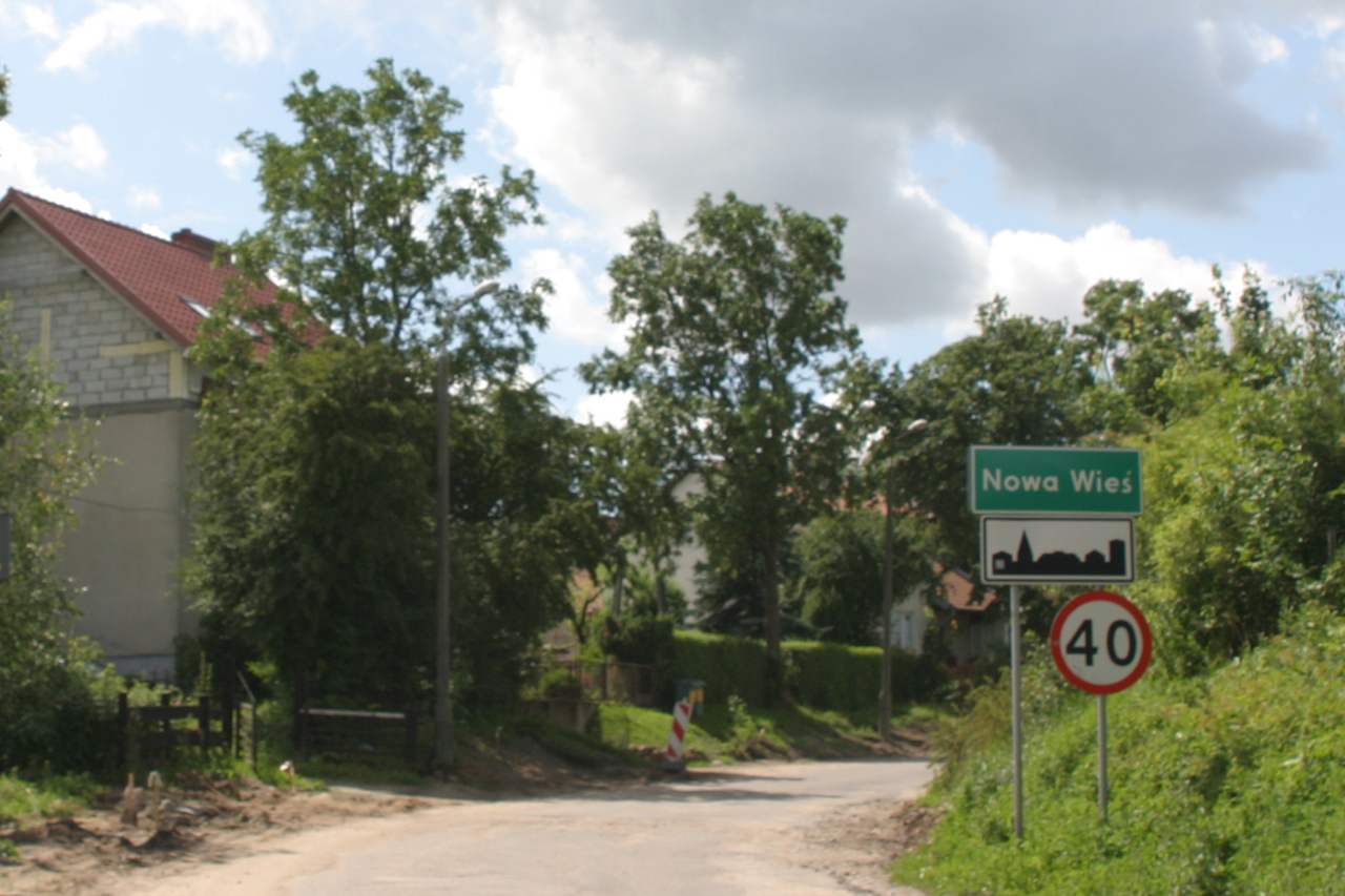 Nowa Wieś Kętrzyńska - OpenStreetMap(Info)